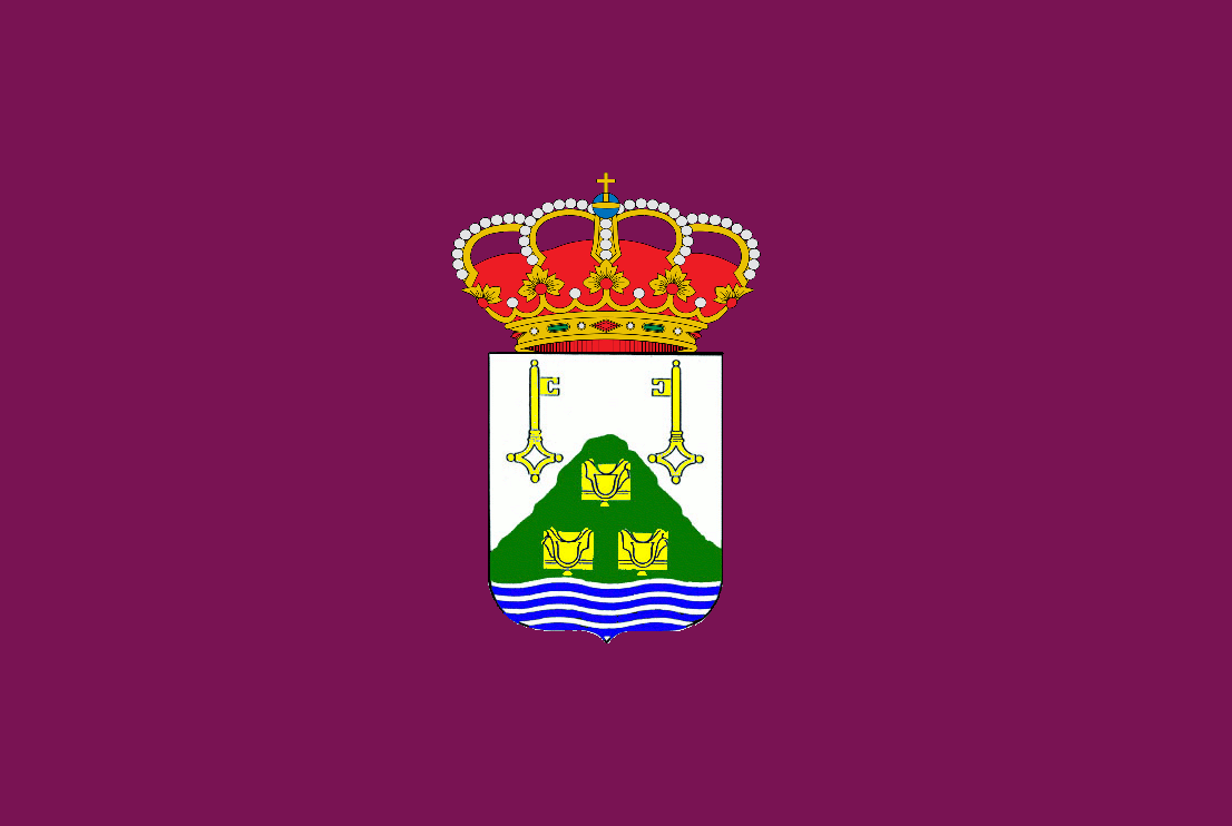 Bandera de la Villa de Tordesillas